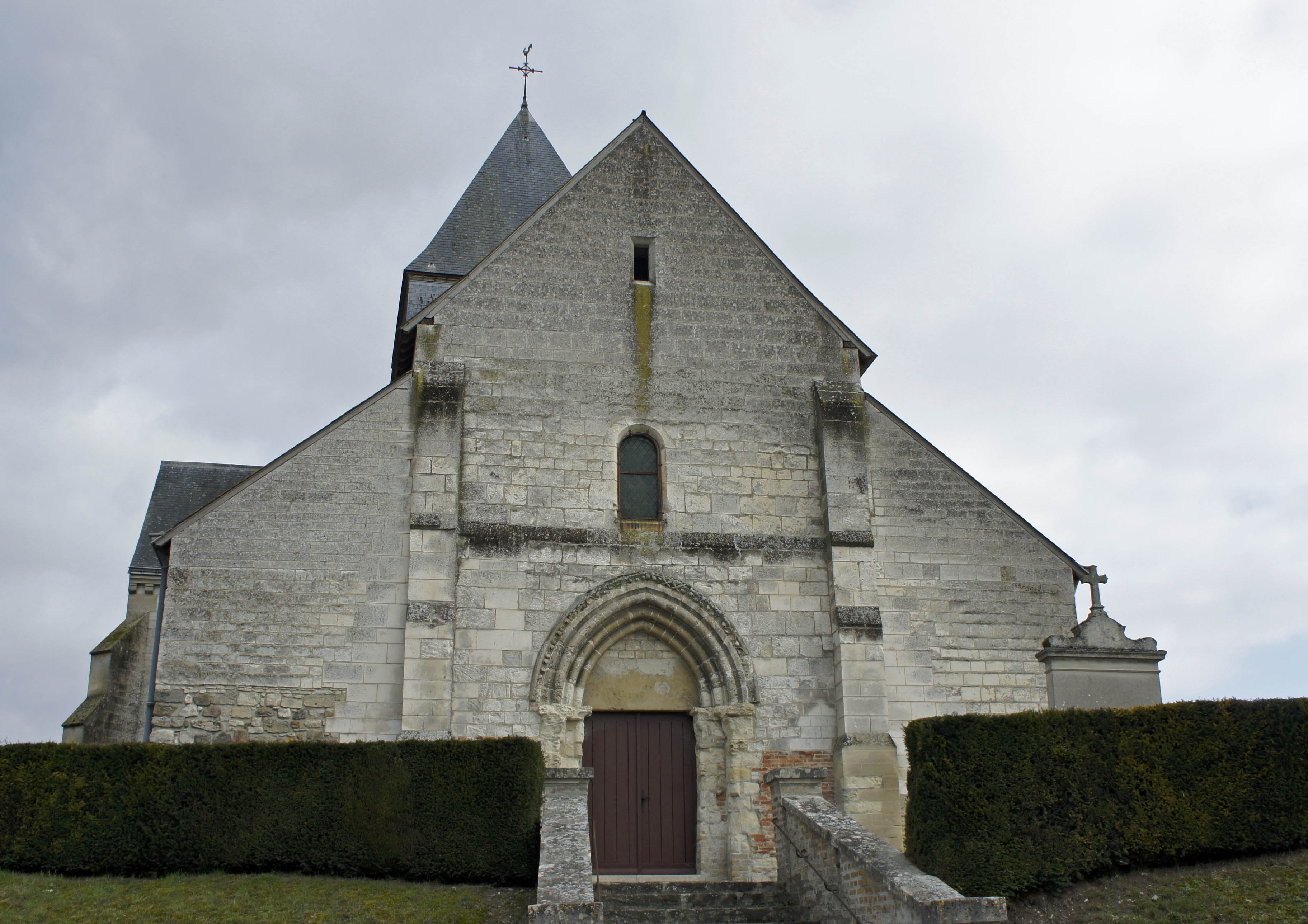 Vue du porche ouest de l'Église de Roizy. Monument du XIIIe et XVIIIe siècle qui est classé.